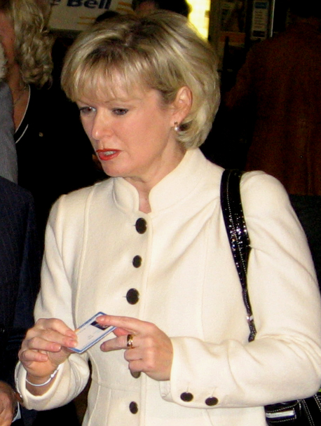 Julie Boulet, ministre des Transports du Québec, lors de sa participation au lancement de la carte OPUS, station Bonaventure à Montréal, le 21 avril 2008. / Julie Boulet, Quebec Transport Minister, participating in the launch of the OPUS card, Bonaventure station in Montreal, 21 April 2008.